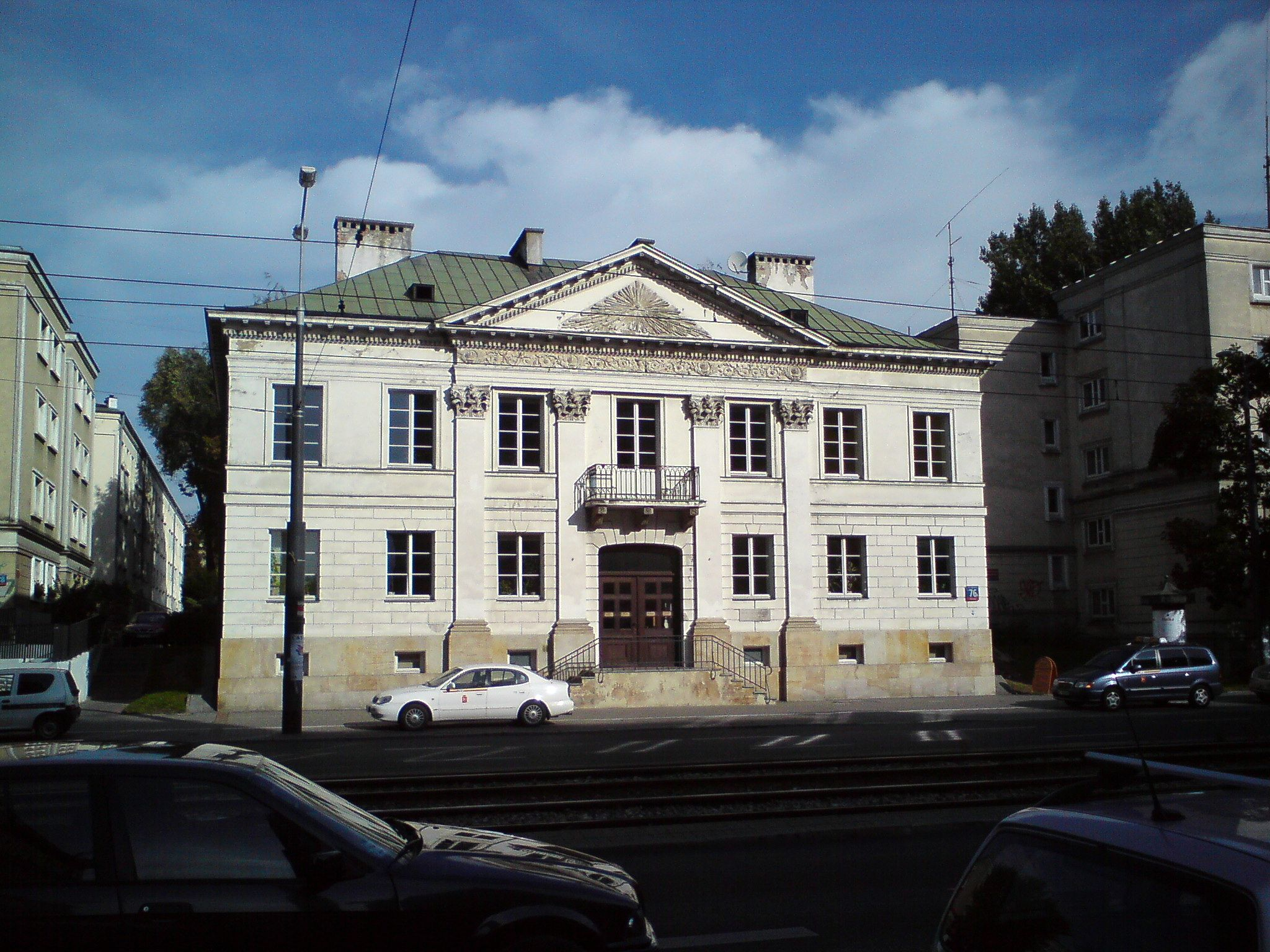 Bydnek parafii kościoła ewangelicko-reformowanego w Warszawie na Woli